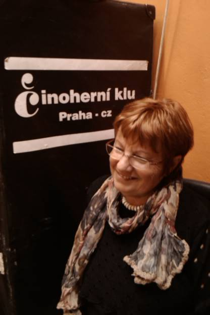 Činoherní klub